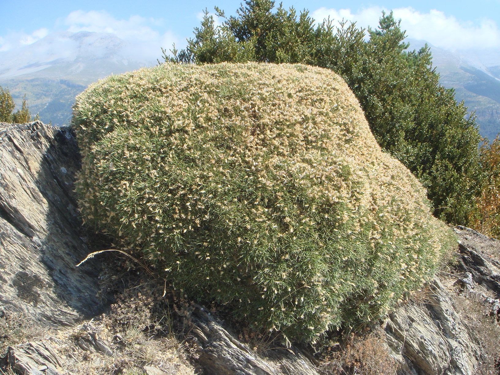 Echinospartum horridum, Tella-Sín , Pirineos, (Huesca), España